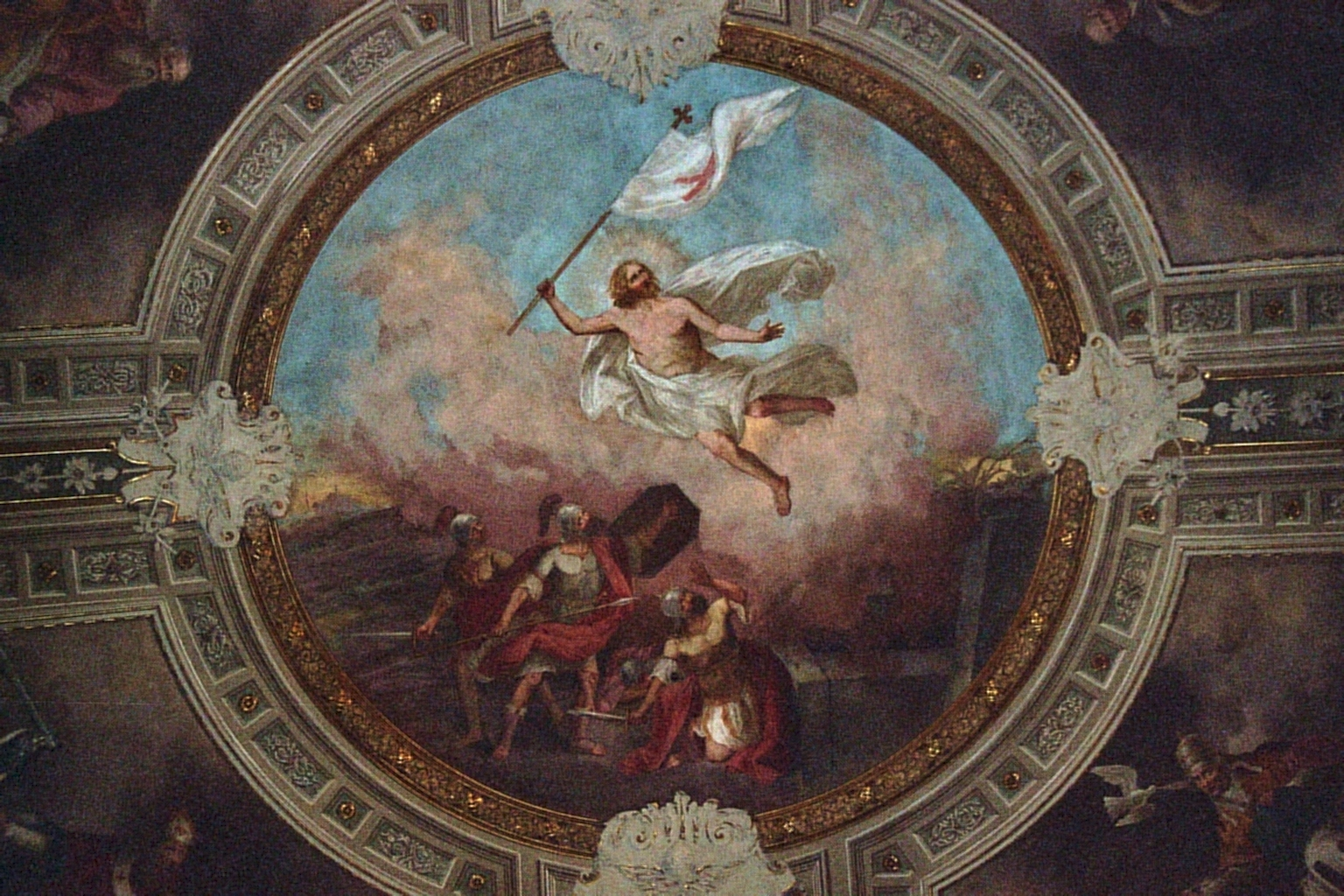 Fara Novarese (NO), Parrocchiale dei Santi Fabiano e Sebastiano: Soffitto del presbiterio, la Resurrezione